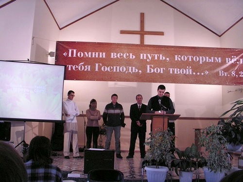 Служители и реабилитанты реабилитационного центра "Возрождение" в церкви ЕХБ "Благая весть" г. Владивостока. Примерно раз в год они объезжают церкви, финансирующие реабцентр, и рассказывают. как у них идут дела.